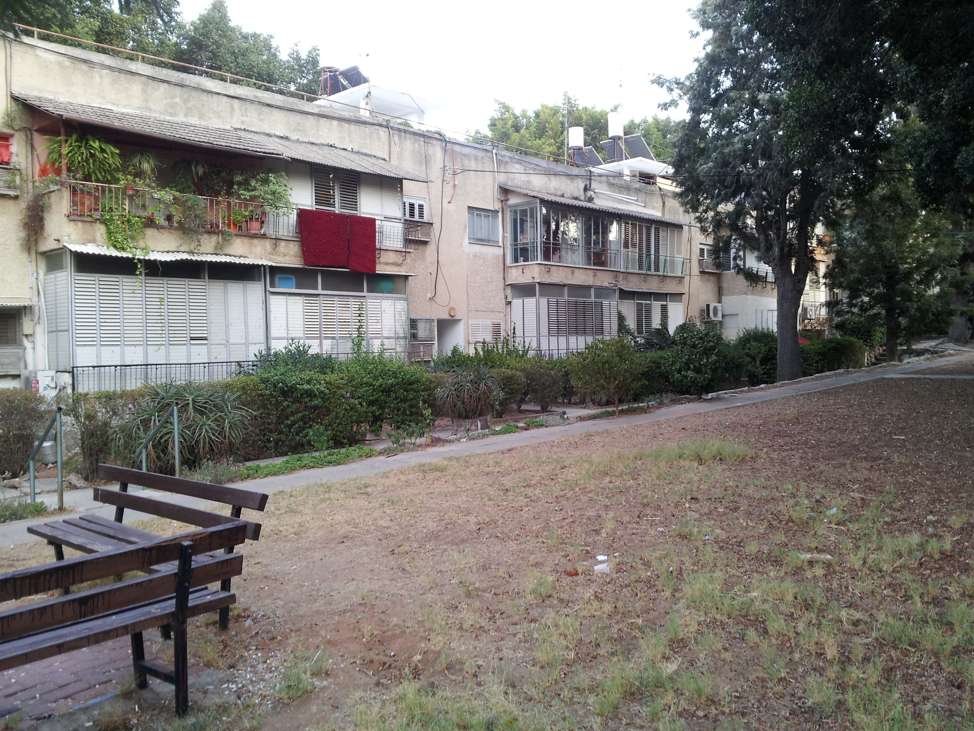 מתחם לביא - מעונות הפועלים